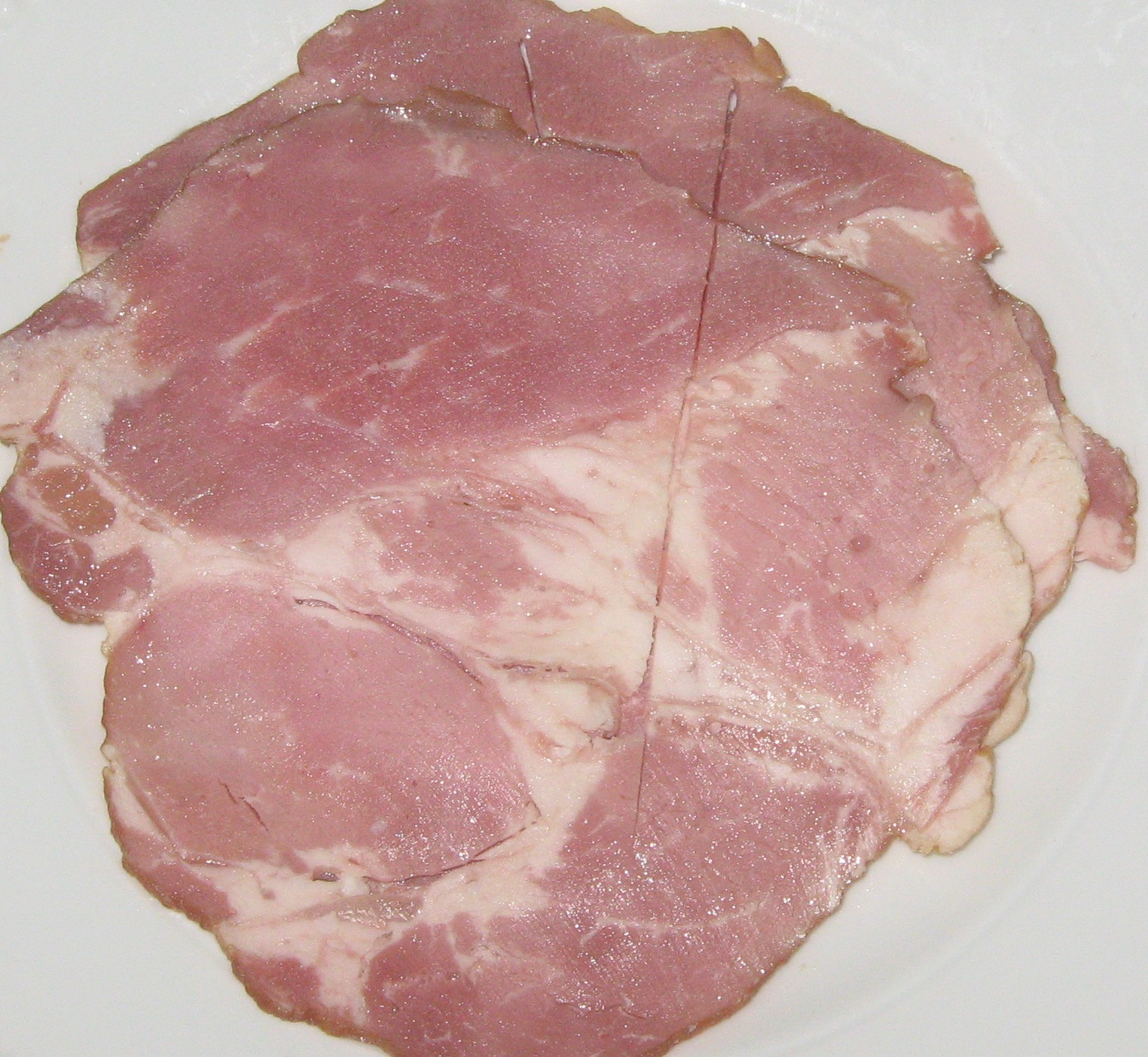 Baleron